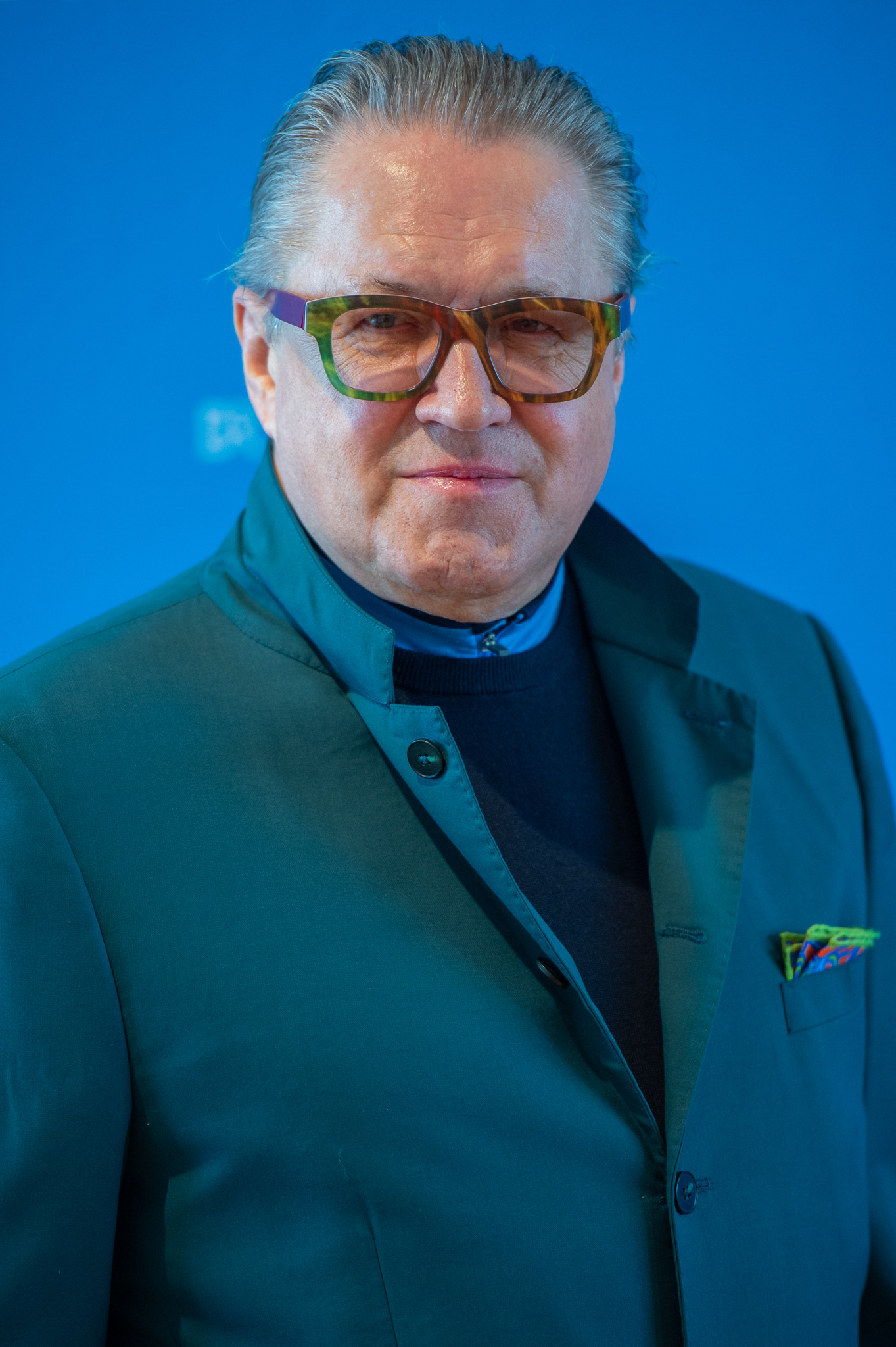 BR,Bayerischer Rundfunk,Bayerisches Fernsehen,Filmbrunch 2019,Literaturhaus München,Michael Brandner